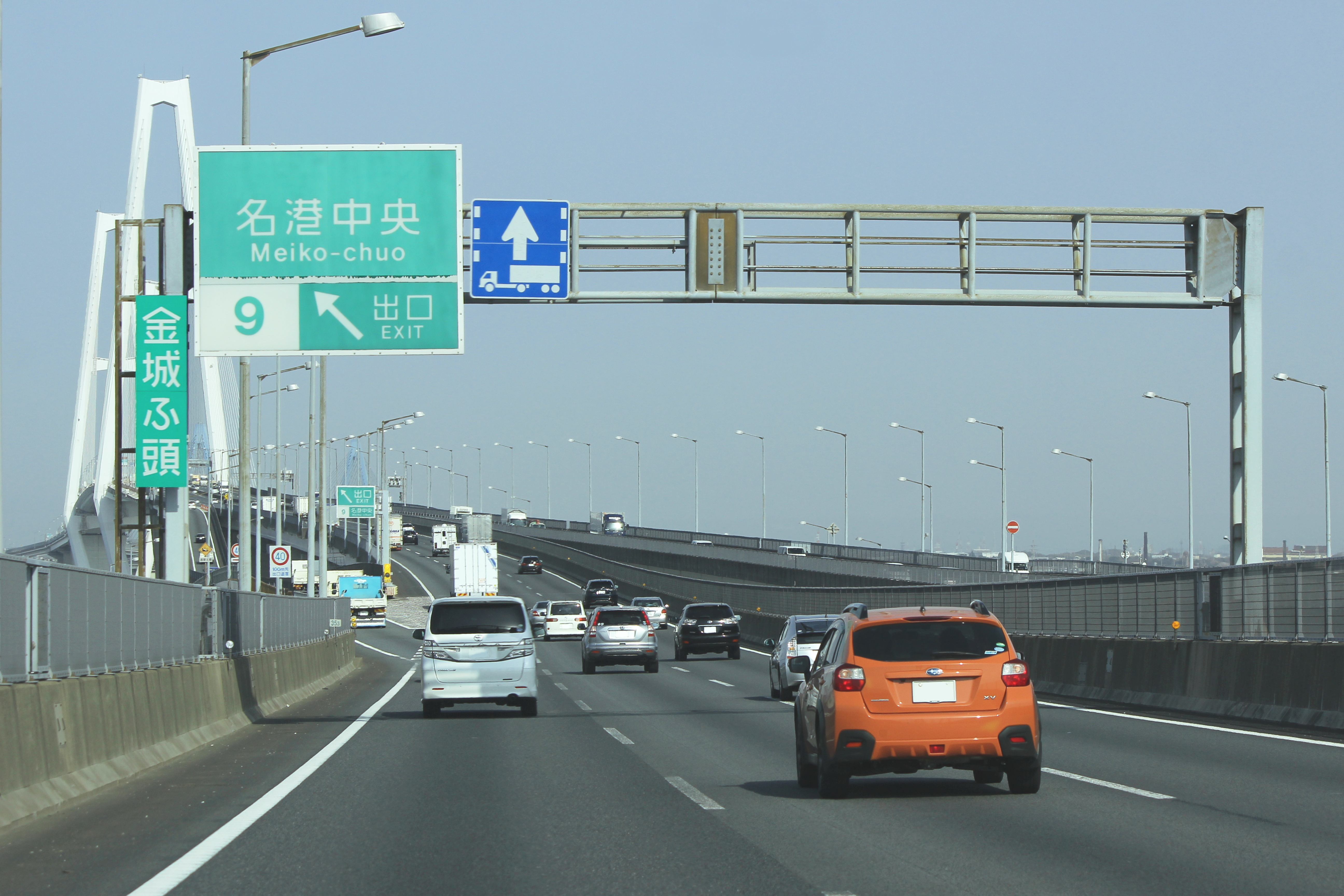 伊勢湾岸道路の本線標識と門形標識柱